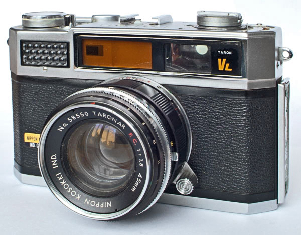 Taron VL